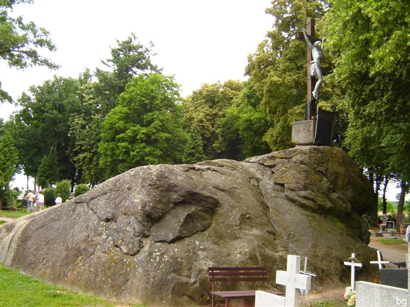 Największy w Polsce Głaz polodowcowy.